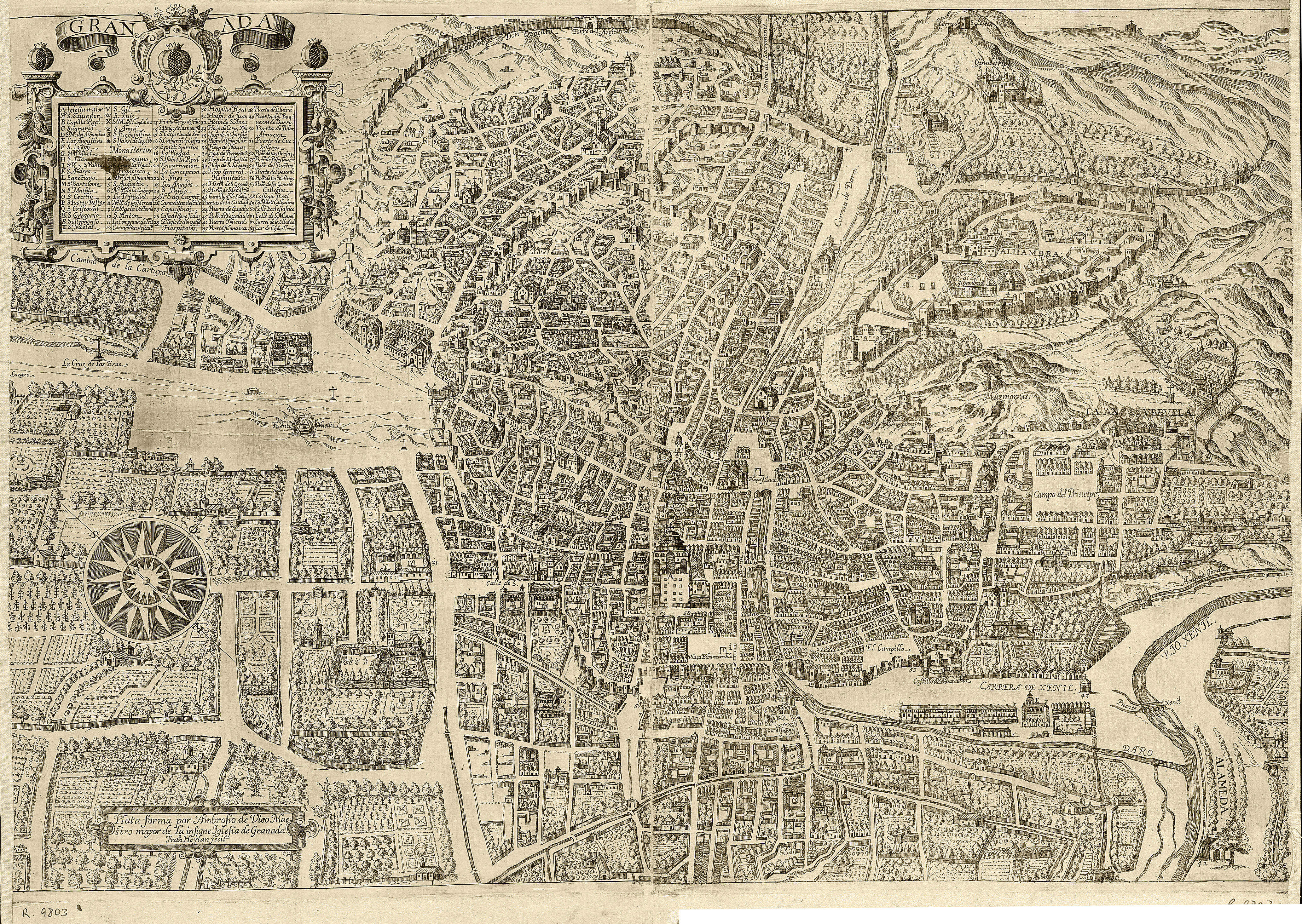 Plataforma de Ambrosio de Vico grabada en dos planchas de cobre de 490 x 303 mm cada una que juntas forman una estampa de 420 x 620 mm.